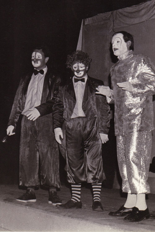 h